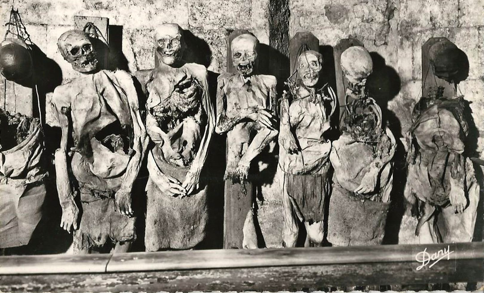 Bordeaux Saint-Michel un groupe de momies